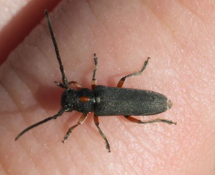 Schafgarben-Böckchen (Phytoecia pustulata) am 18. April 2019 nahe Heidelberg